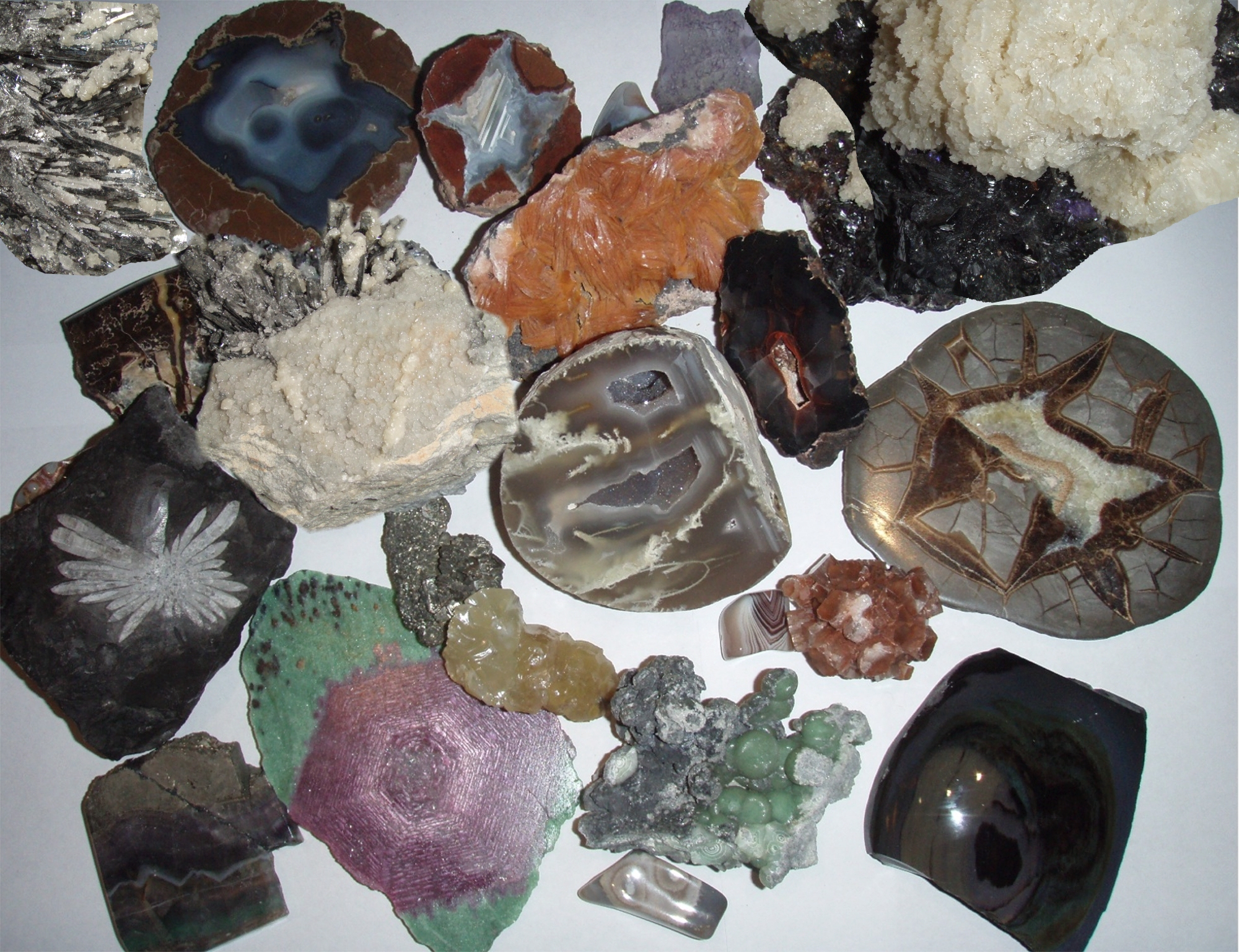 minerales ya pulidos y tallado